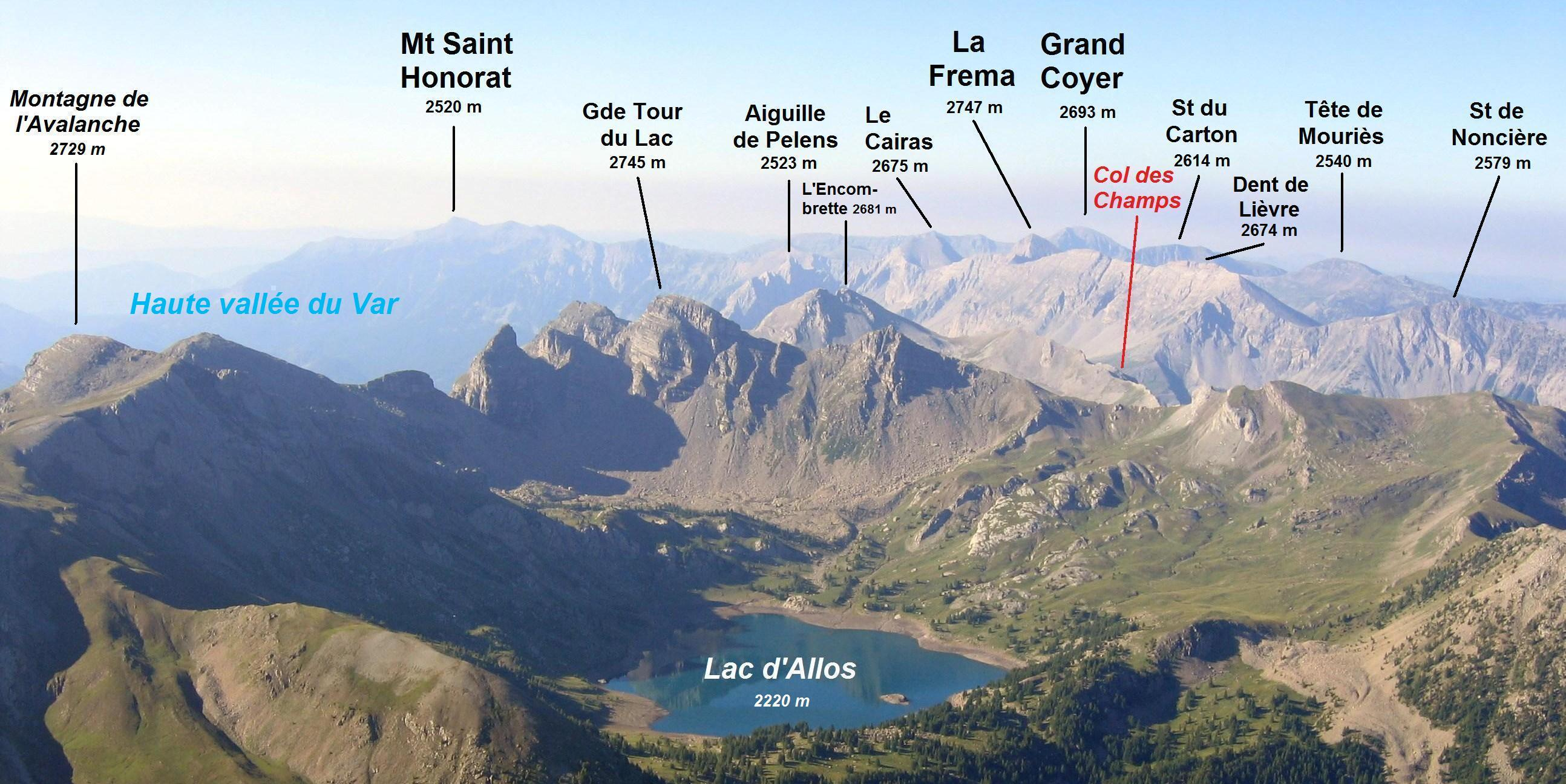 Panorama légendé du massif du Pelat (dit aussi "chaîne Pelat-Frema-Grand Coyer") à partir de la photo prise le 13/05/2006 du Mont Pelat (3050 m) par Helac sous licence Créative Commons partage à l'identique. Photographie recadrée et légendée par André Payan-Passeron le 17/01/2013 sous la même licence.